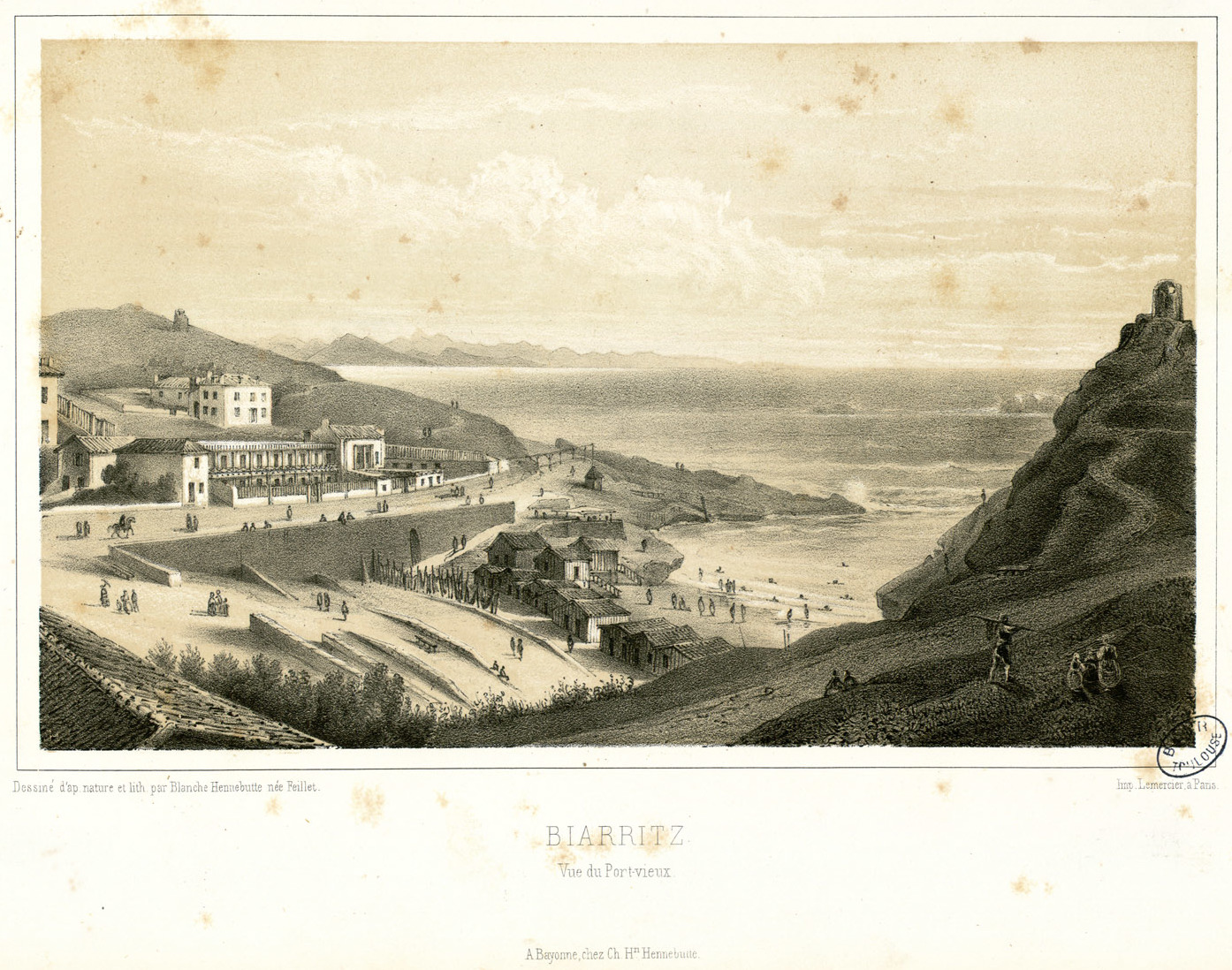 Fait partie d'un album de lithographies en deux parties : France (pl. 1 à 17) et Espagne (pl. 18 à 28). 2 pl. en frontispice et un Plan de la Côte de Biarrits (i.e. Biarritz) Faux titre : Description des environs de Bayonne et de Saint Sébastien Pièce jointe : lettre datée du 24 octobre 1928; papier à lettres avec en-tête au nom du Musée Social de Paris. Ancely, René (1876 - 1966). Possesseur